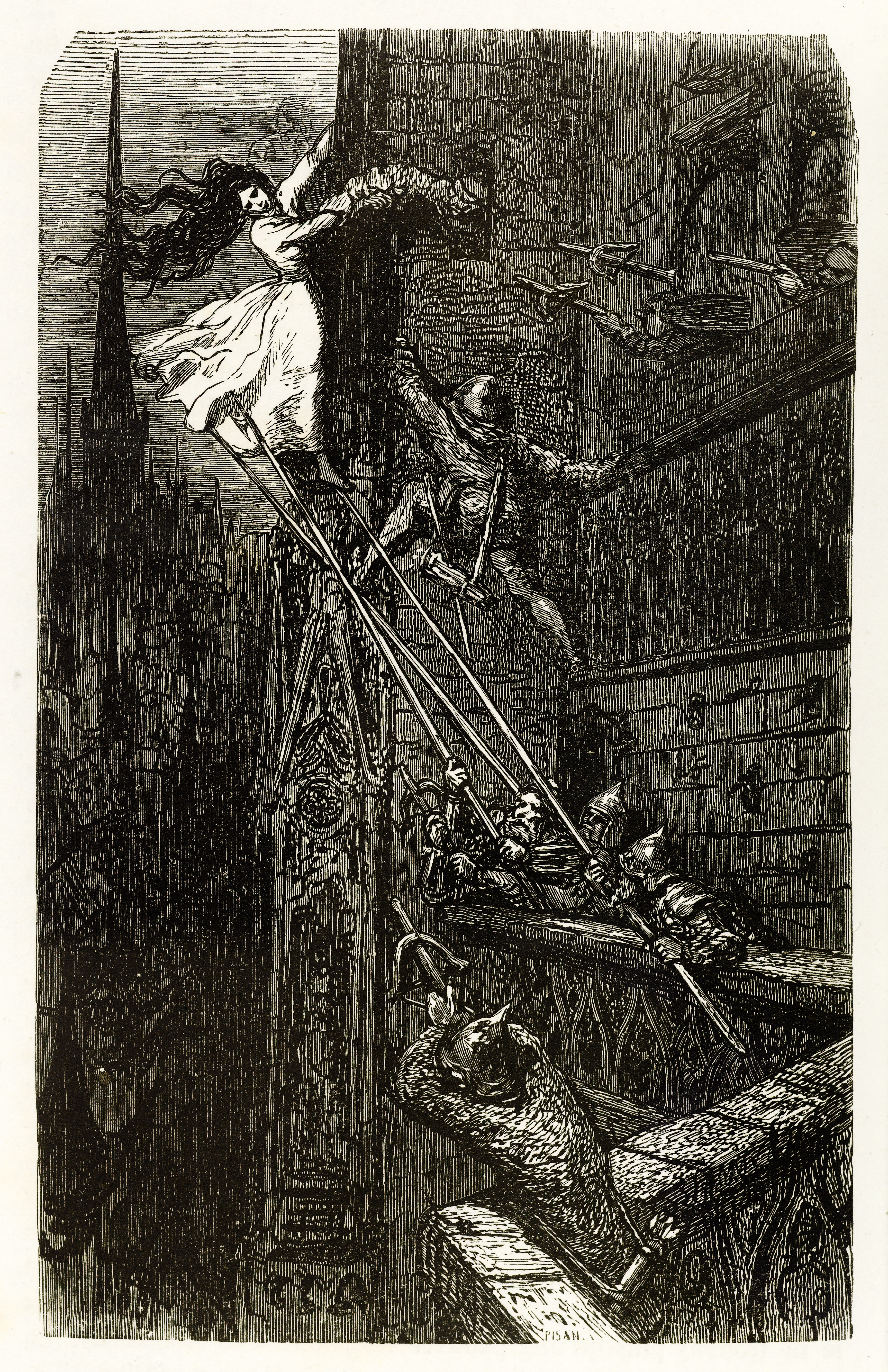 火刑から死に物狂いで逃走を図るズュルマ